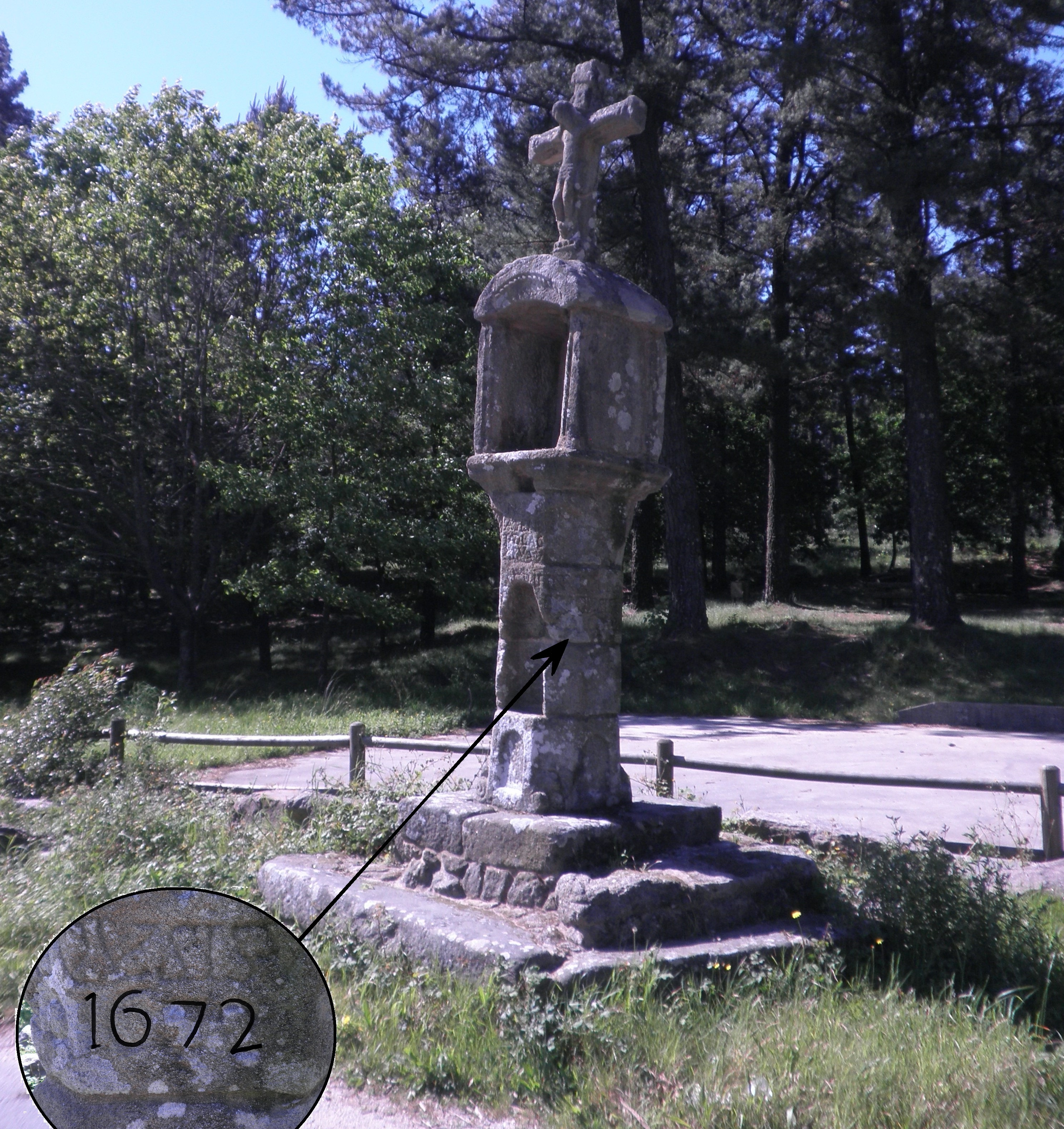 A Cruz de Avelán coa inscripción 1672. Tratada dixitalmente.